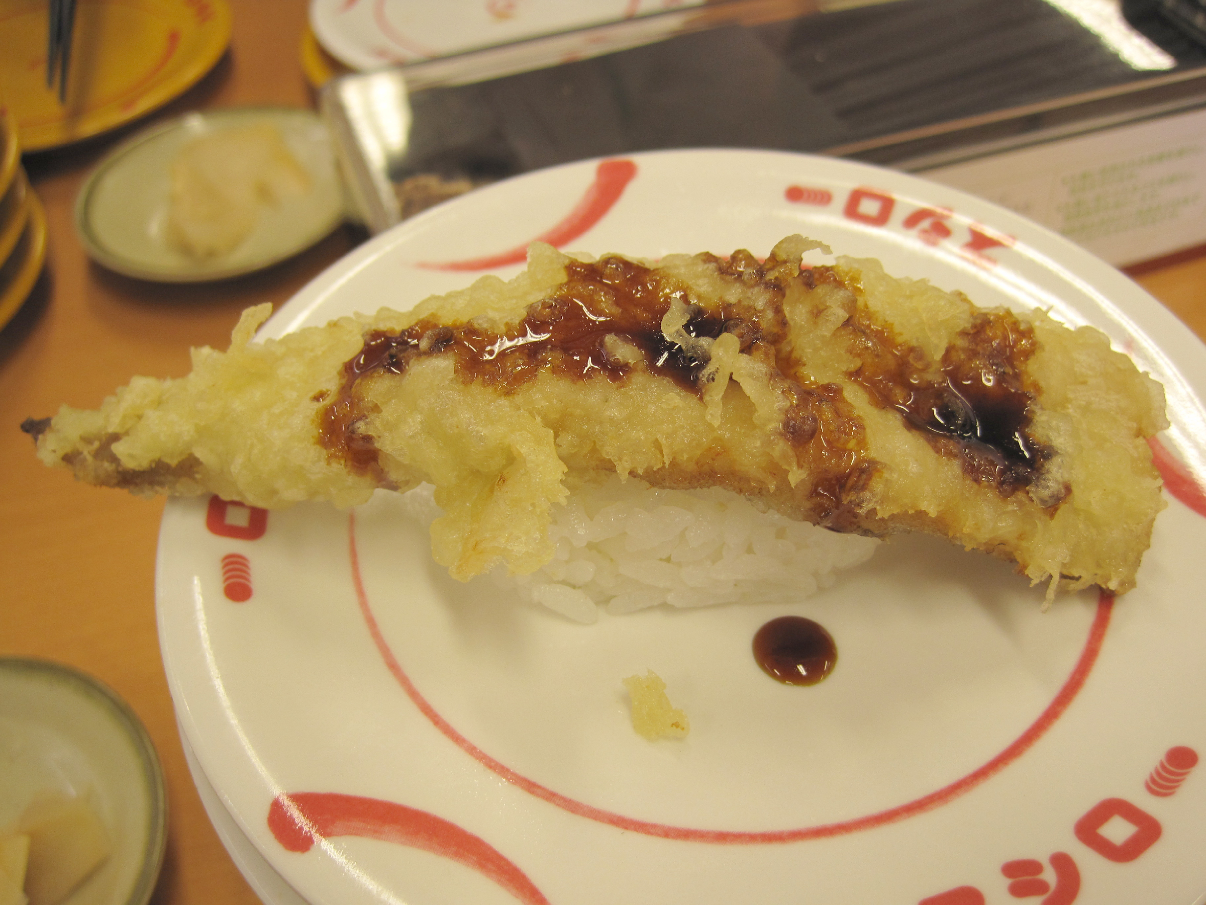 スシローのあなご天